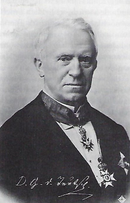 Porträtfotografie von Georg Daniel Teutsch